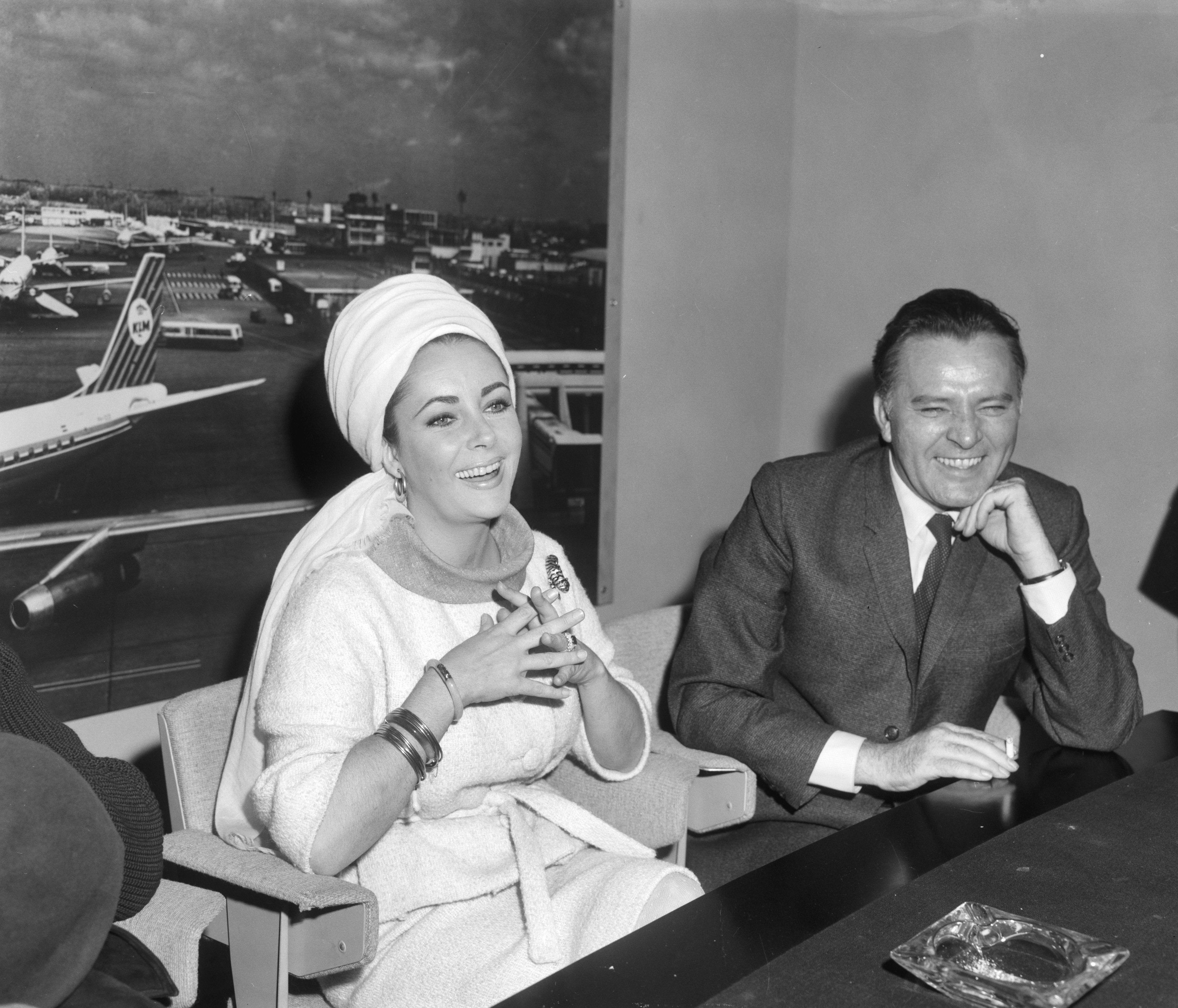 Collectie / Archief : Fotocollectie Anefo Reportage / Serie : [ onbekend ] Beschrijving : Liz Taylor en Richard Burton tijdens persconferentie op Schiphol [betreft film "The spy who came in from the cold", waarin Richard Burton de hoofdrol speelde, red.] Datum : 26 april 1965 Locatie : Noord-Holland, Schiphol Trefwoorden : acteurs, actrices, filmsterren, persconferenties, vliegvelden Persoonsnaam : Burton, Richard, Taylor, Elizabeth Fotograaf : Bilsen, Joop van / Anefo Auteursrechthebbende : Nationaal Archief Materiaalsoort : Negatief (zwart/wit) Nummer archiefinventaris : bekijk toegang 2.24.01.04 Bestanddeelnummer : 917-6934